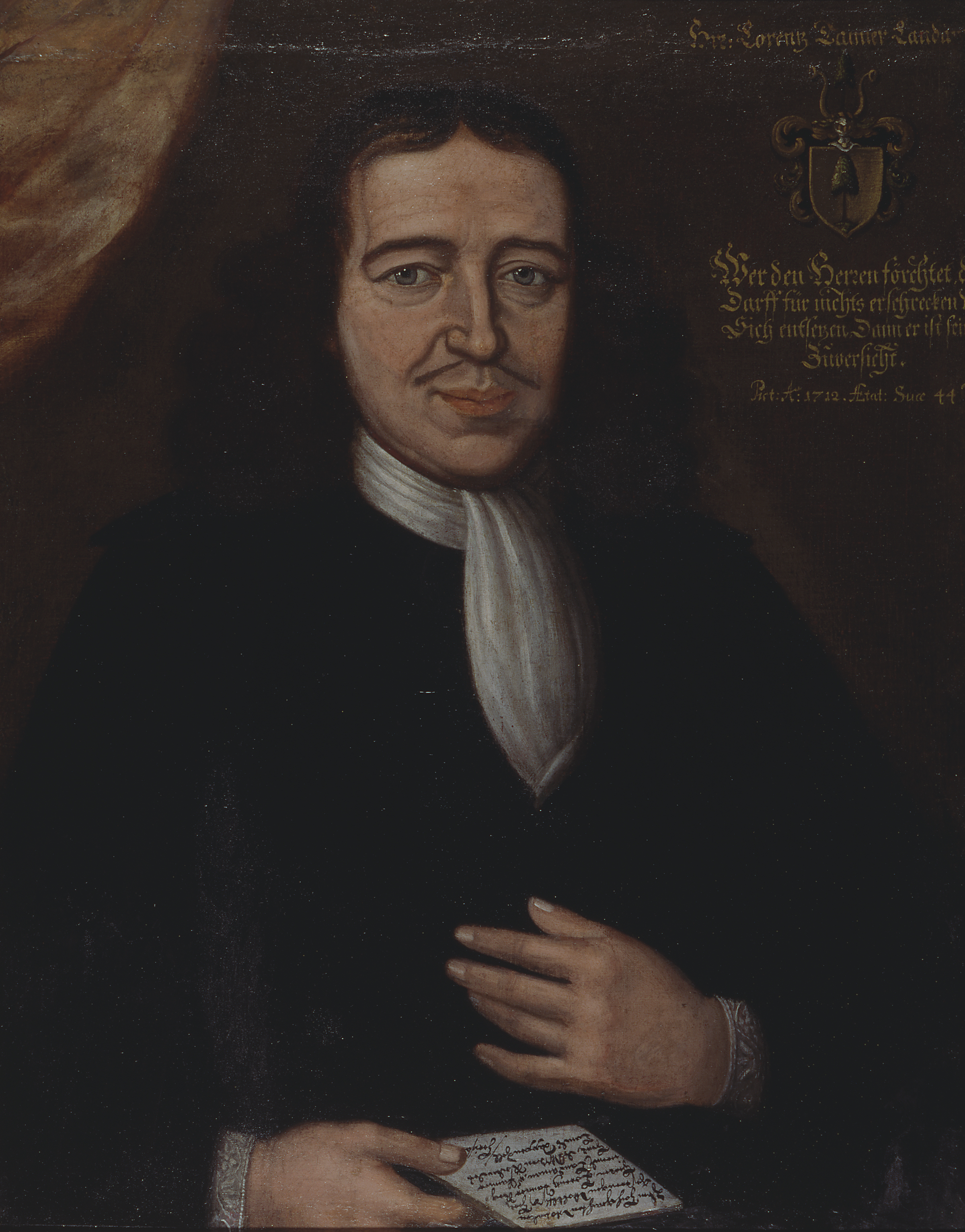 17. Landammann von Appenzell Ausserrhoden, Brustbildnis